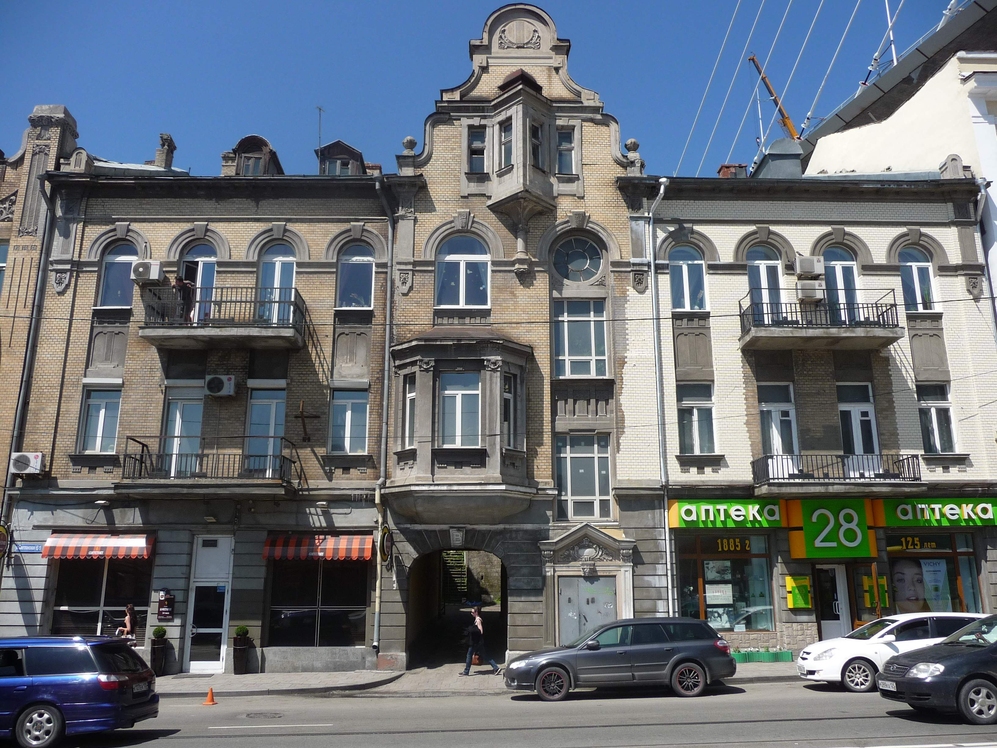 Владивосток, ул. Светланская, 61, 2012-07-05. Идёт ремонт к саммиту АТЭС (отбеливают потемневшие от времени кирпичи)